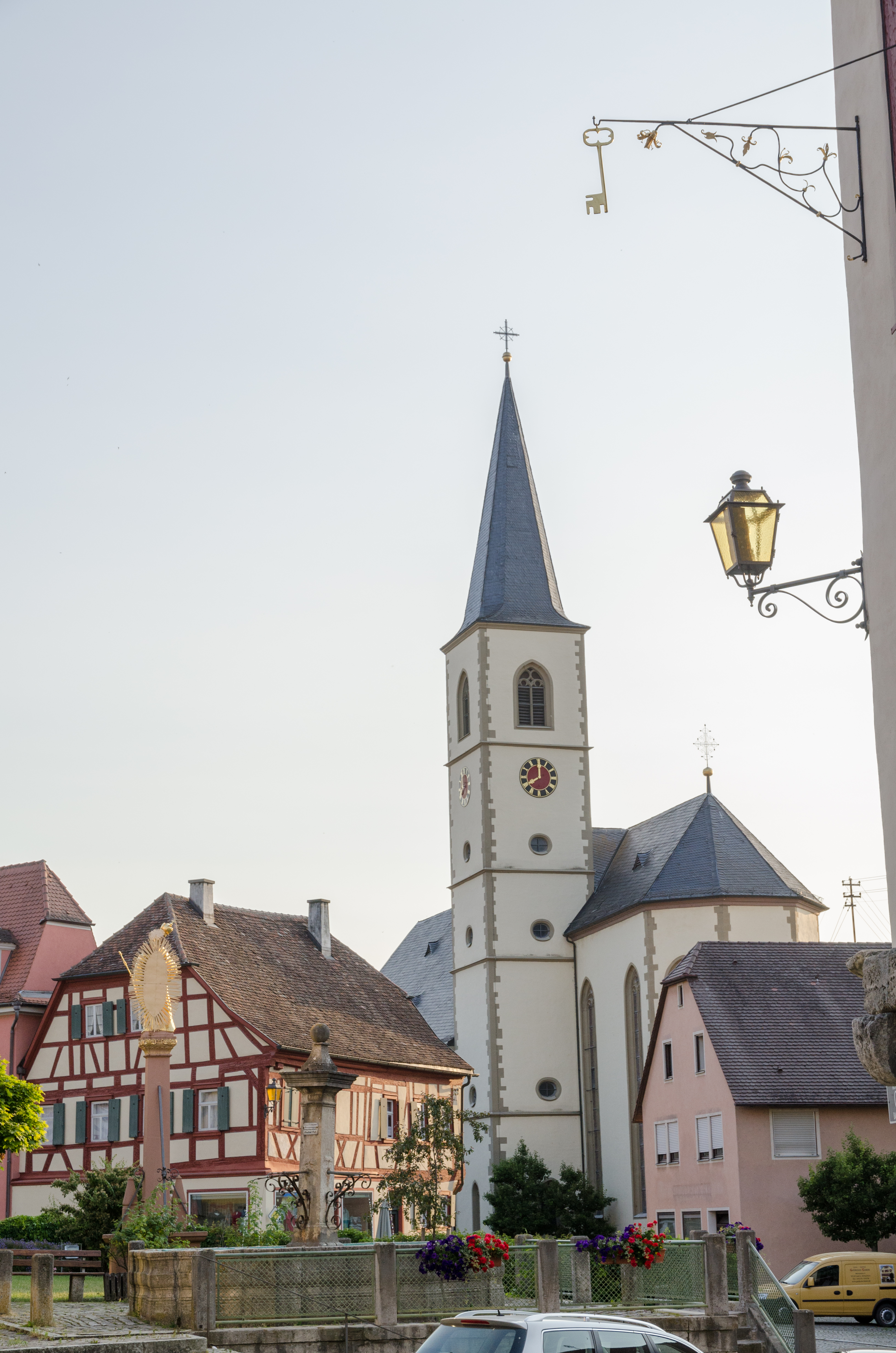 Aub, Kath. Kirche